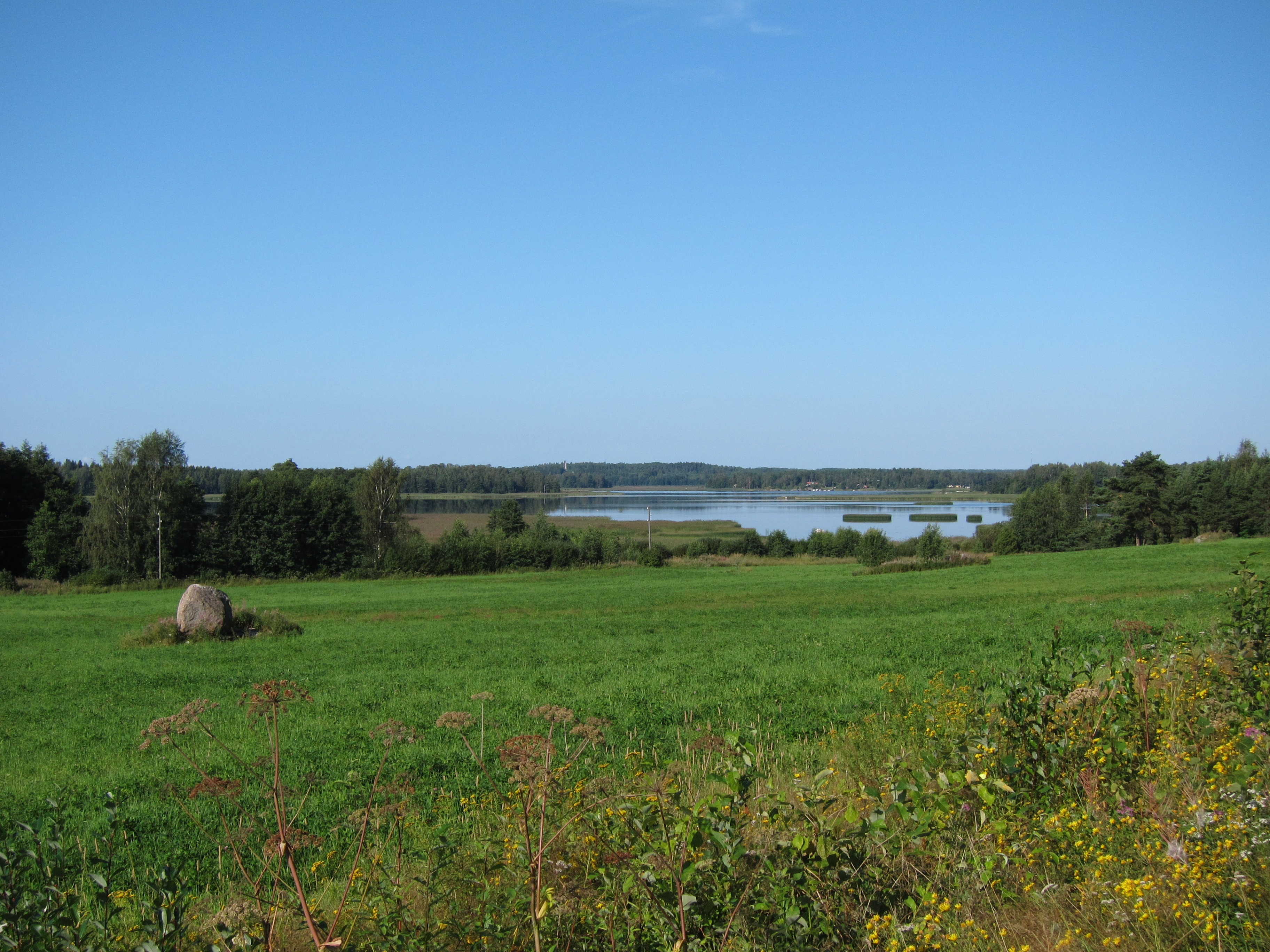 Suomenlahden Virolahden pohjukkaa Virolahden kunnassa.